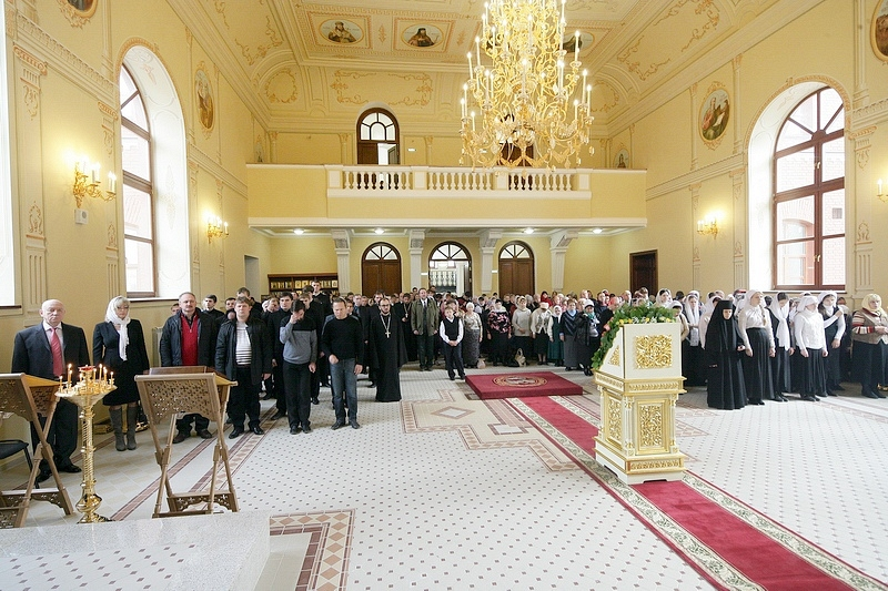 Семинарский храм в честь Апостола и евангелиста Иоанна Богослова